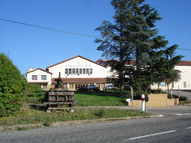 Bully (Rhône-69) : Cave des Vignerons (Cave Coopérative).jpg